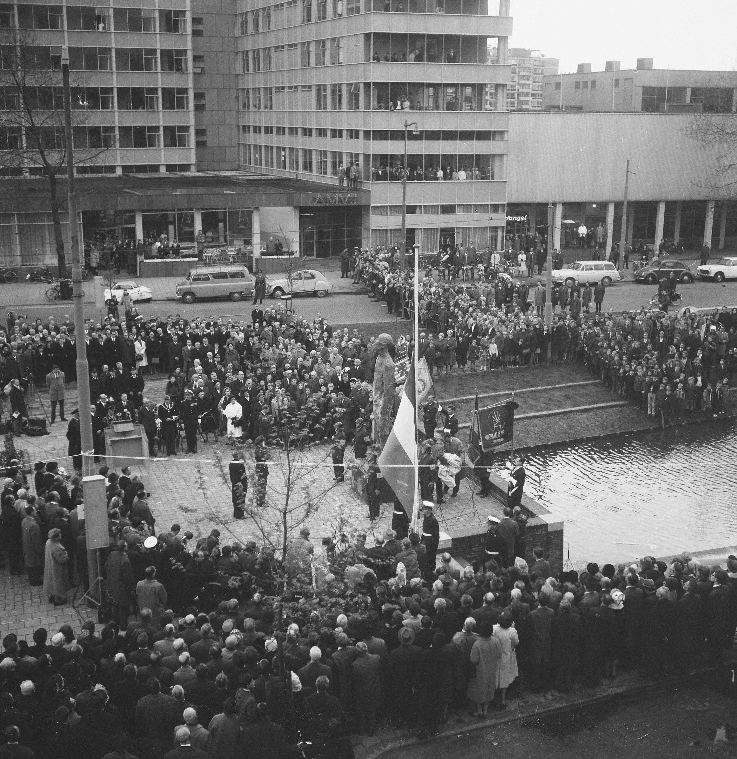 Collectie / Archief : Fotocollectie Anefo Reportage / Serie : [ onbekend ] Beschrijving : Prins Bernhard onthulde het verzetsmonument Ongebroken Verzet aan de Westersingel te Rotterdam Annotatie : Het beeld is een ontwerp van Hubert C.M. van Lith Datum : 11 mei 1965 Locatie : Rotterdam, Zuid-Holland Trefwoorden : onthullingen, oorlogsmonumenten, verzet Fotograaf : Voets, Jan / Anefo, [onbekend] Auteursrechthebbende : Nationaal Archief Materiaalsoort : Negatief (zwart/wit) Nummer archiefinventaris : bekijk toegang 2.24.01.03 Bestanddeelnummer : 917-7536